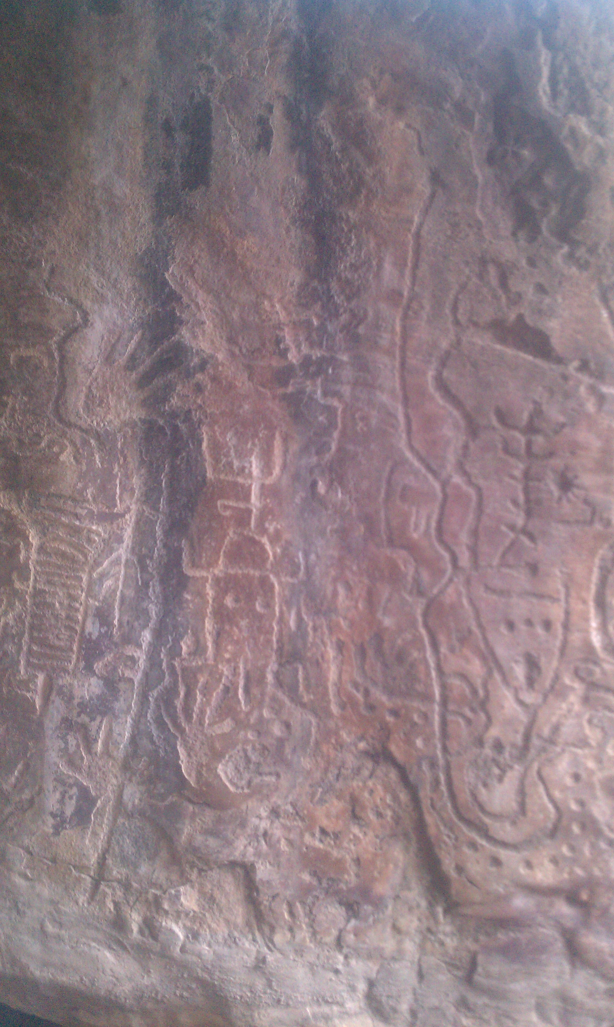 en este lugar hay muchos labrabos ancestrales de diversas figuras